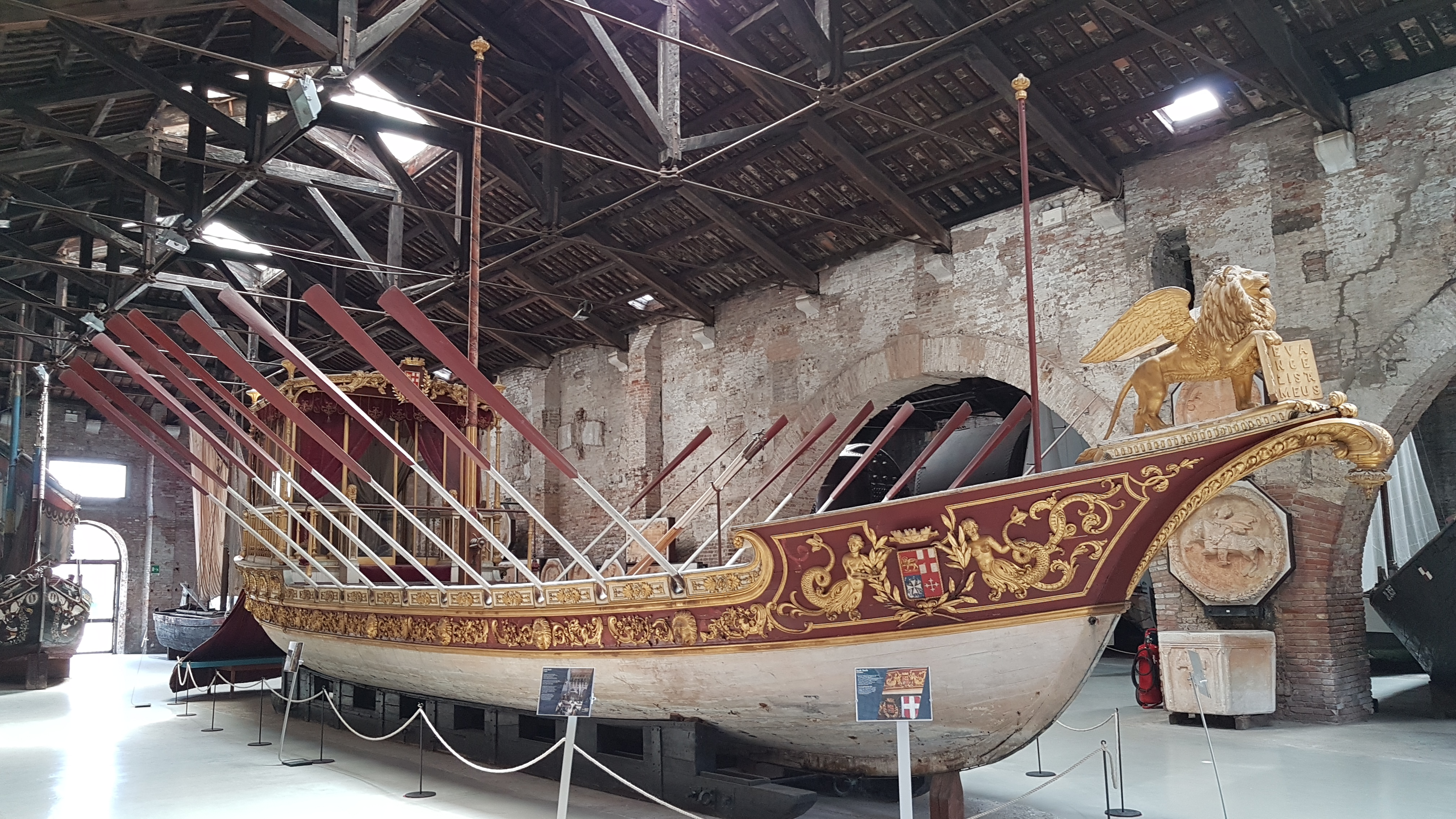 Venedig, Museo storico navale, historisches (?) Dogenschiff.